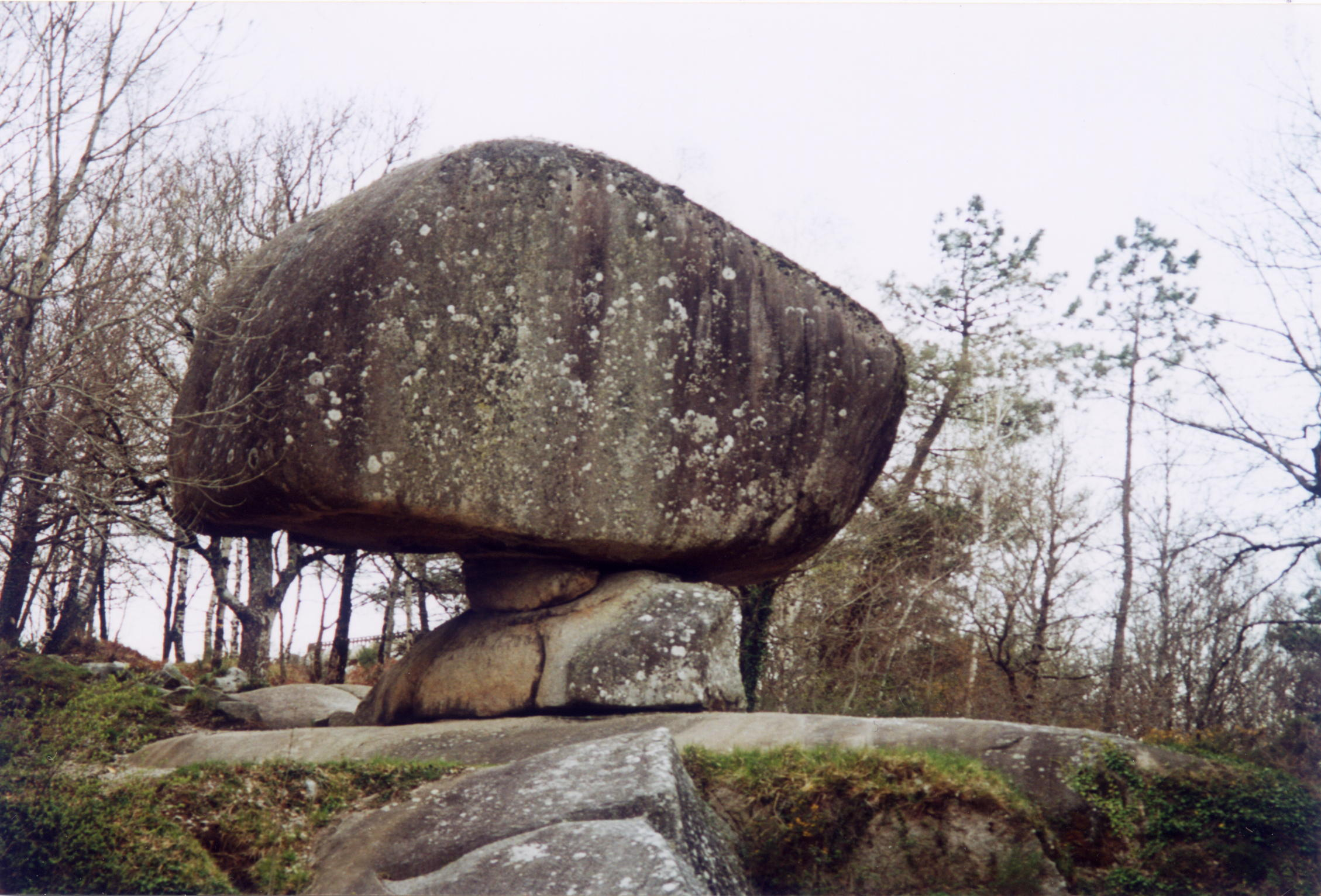 Le Peyro Clabado, dans le massif du Sidobre (Tarn)